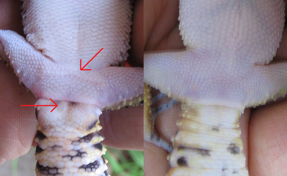 weiblicher Leopardgecko